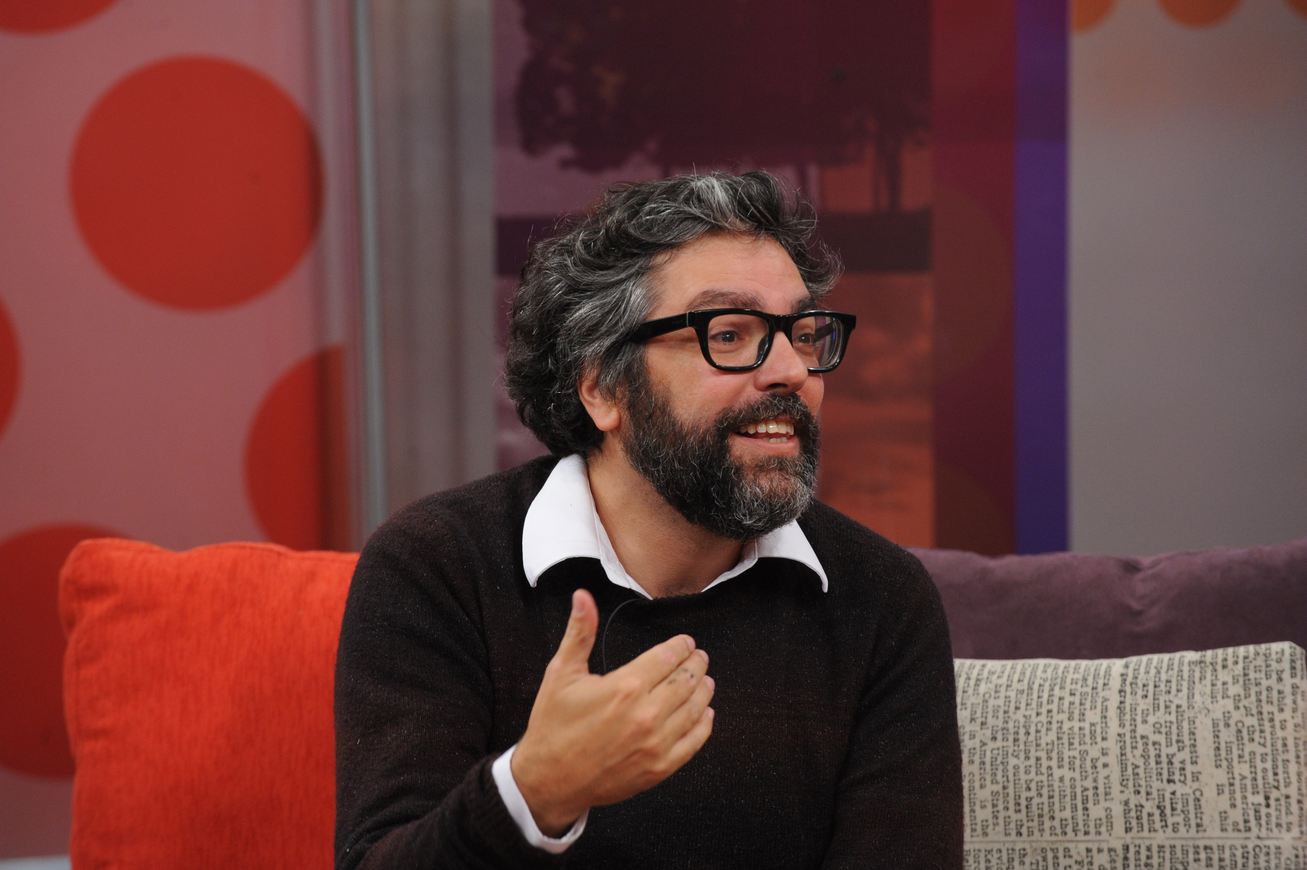 liniers1